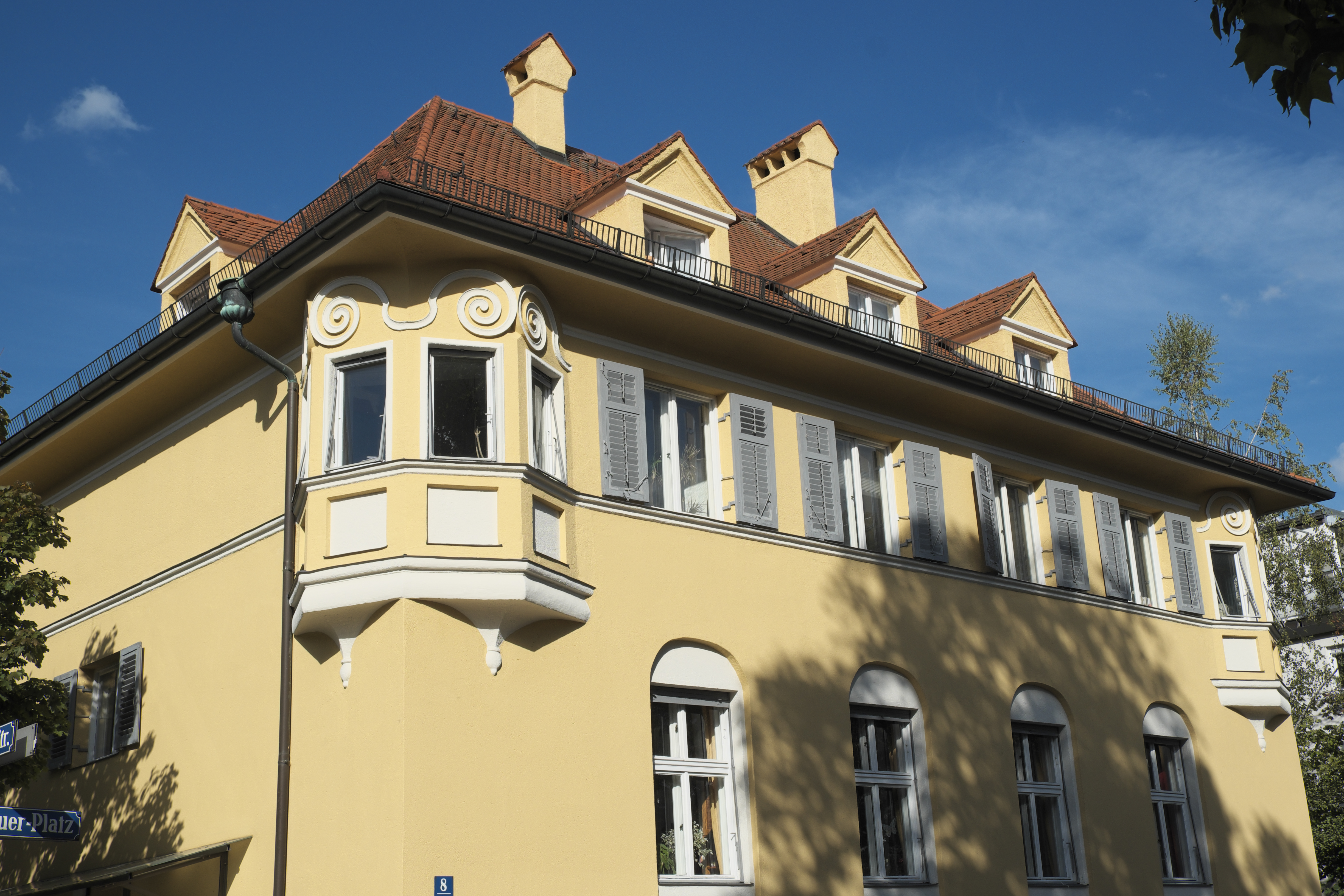 Villa am Agnes-Bernauer-Platz 8 im Stadtbezirk Laim in München (Bayern/Deutschland), 1912 von Theodor Fischer errichtet